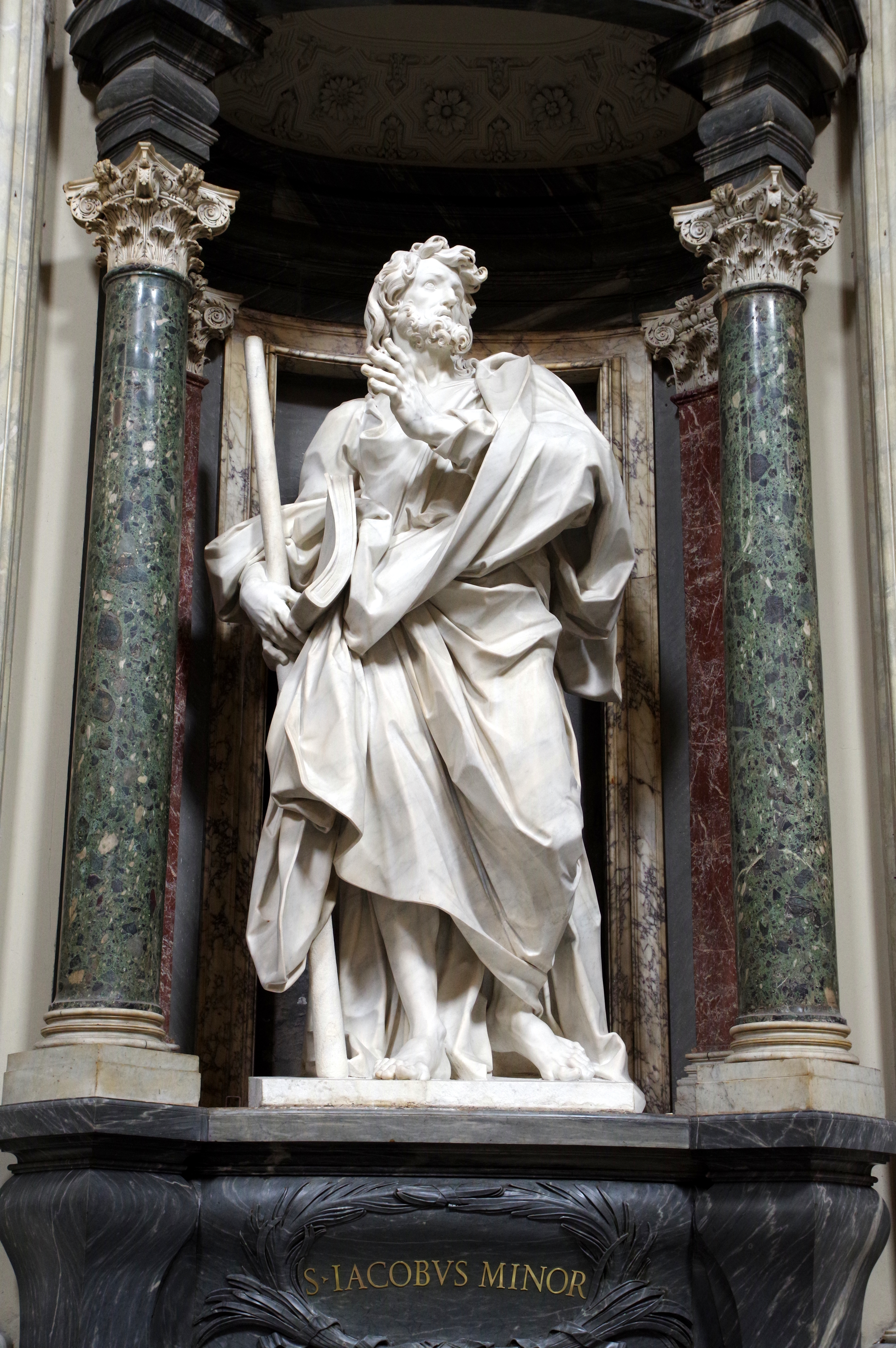 Statue de l'apôtre saint Jacques le Mineur à la basilique Saint-Jean-de-Latran à Rome.